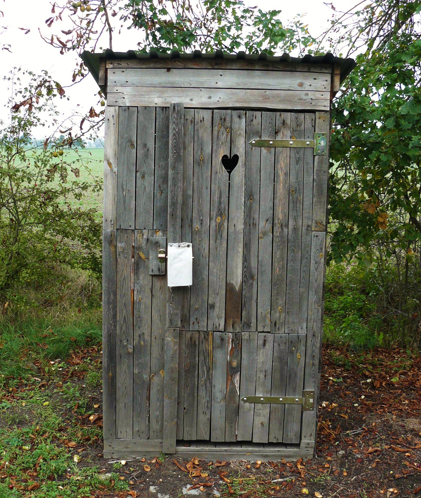 kp. WC na stacji Ujazd Wlkp.